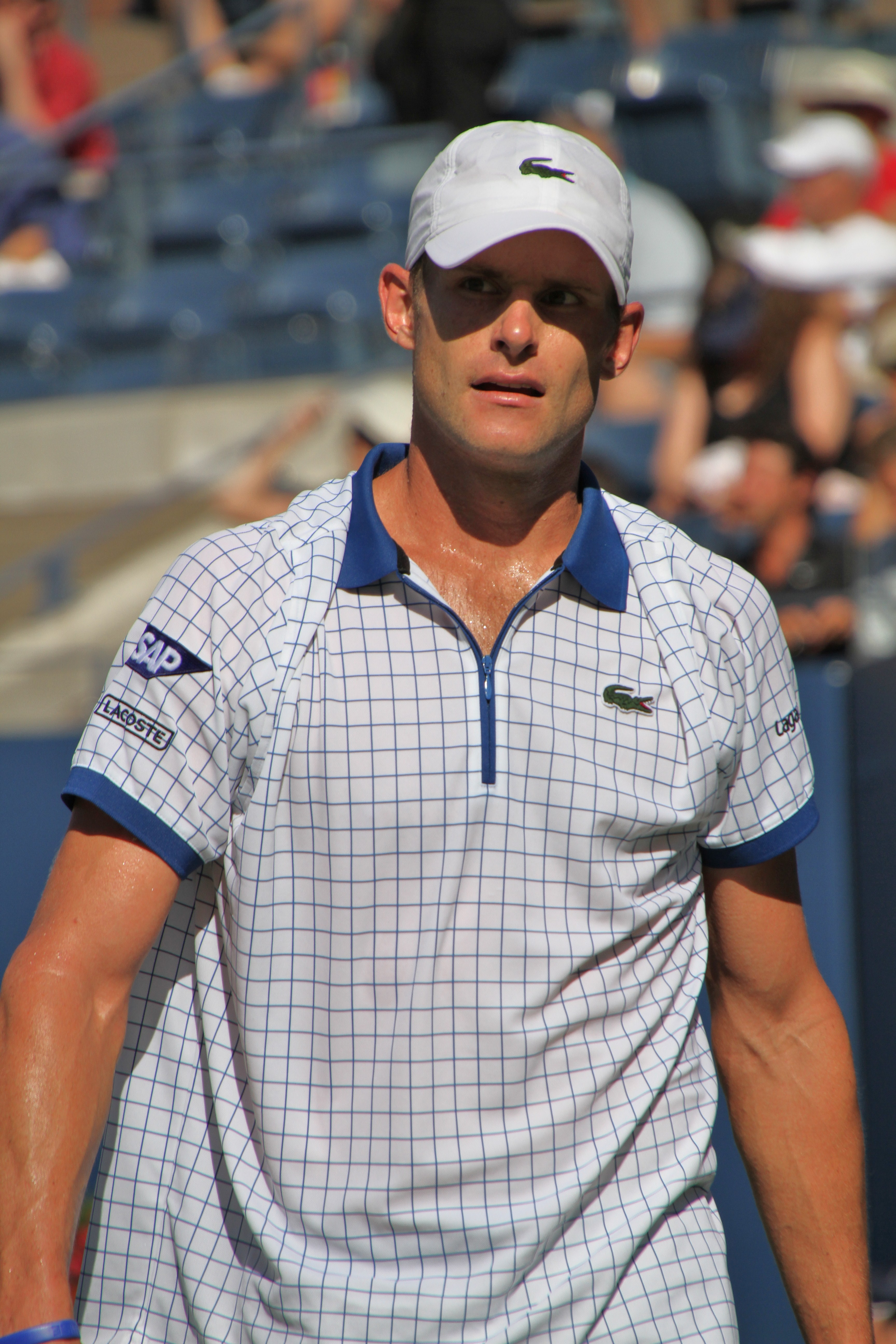 Andy Roddick - US Open 2010